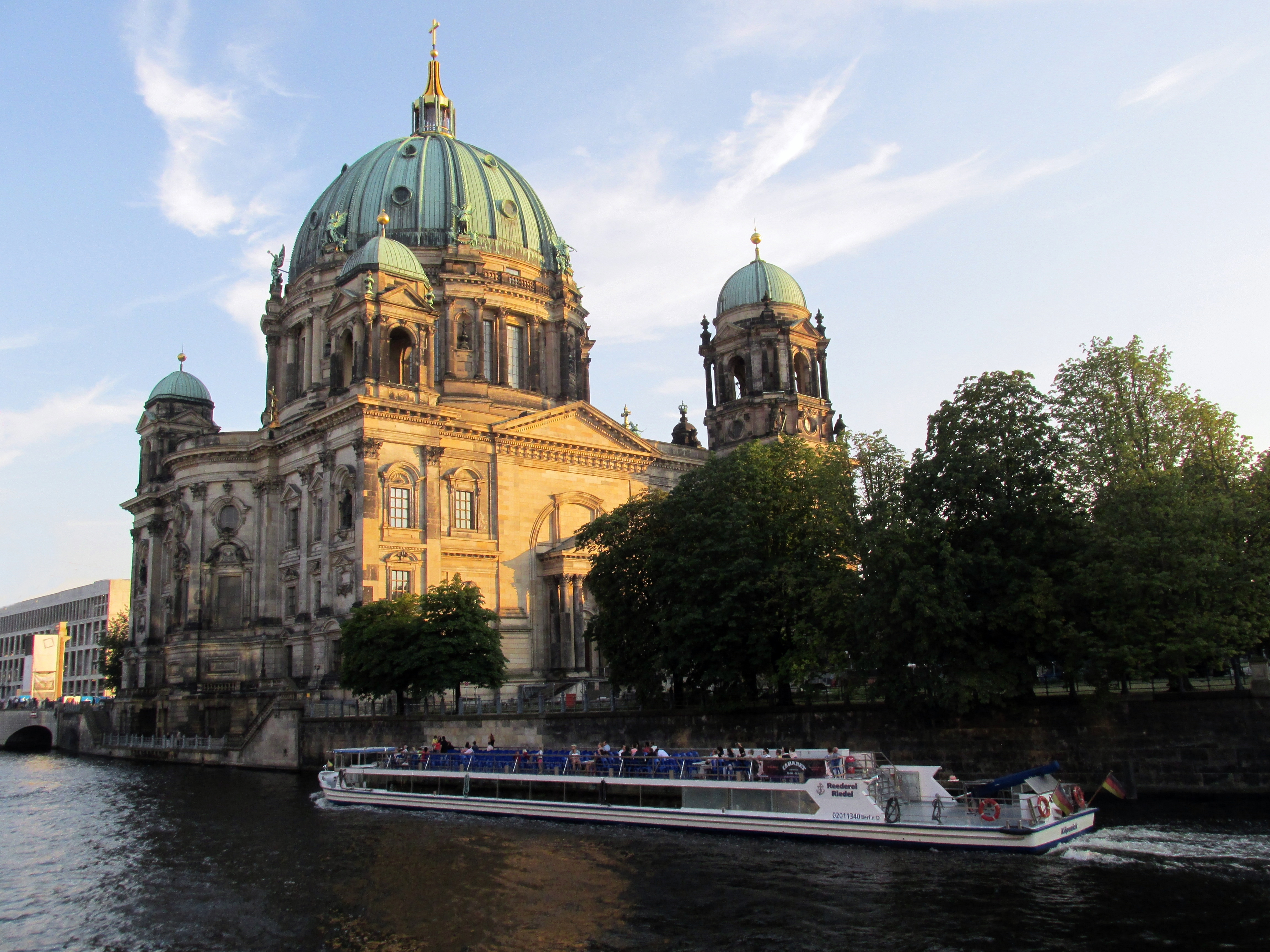 Berliner Dom